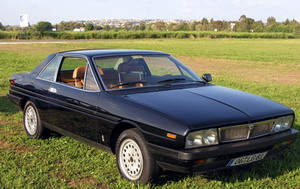 Gamma coupe